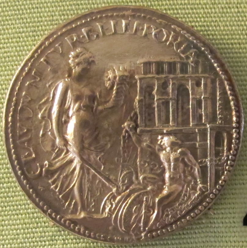 Benvenuto cellini, papa clemente VII, 1534, v. con allegoria della pace